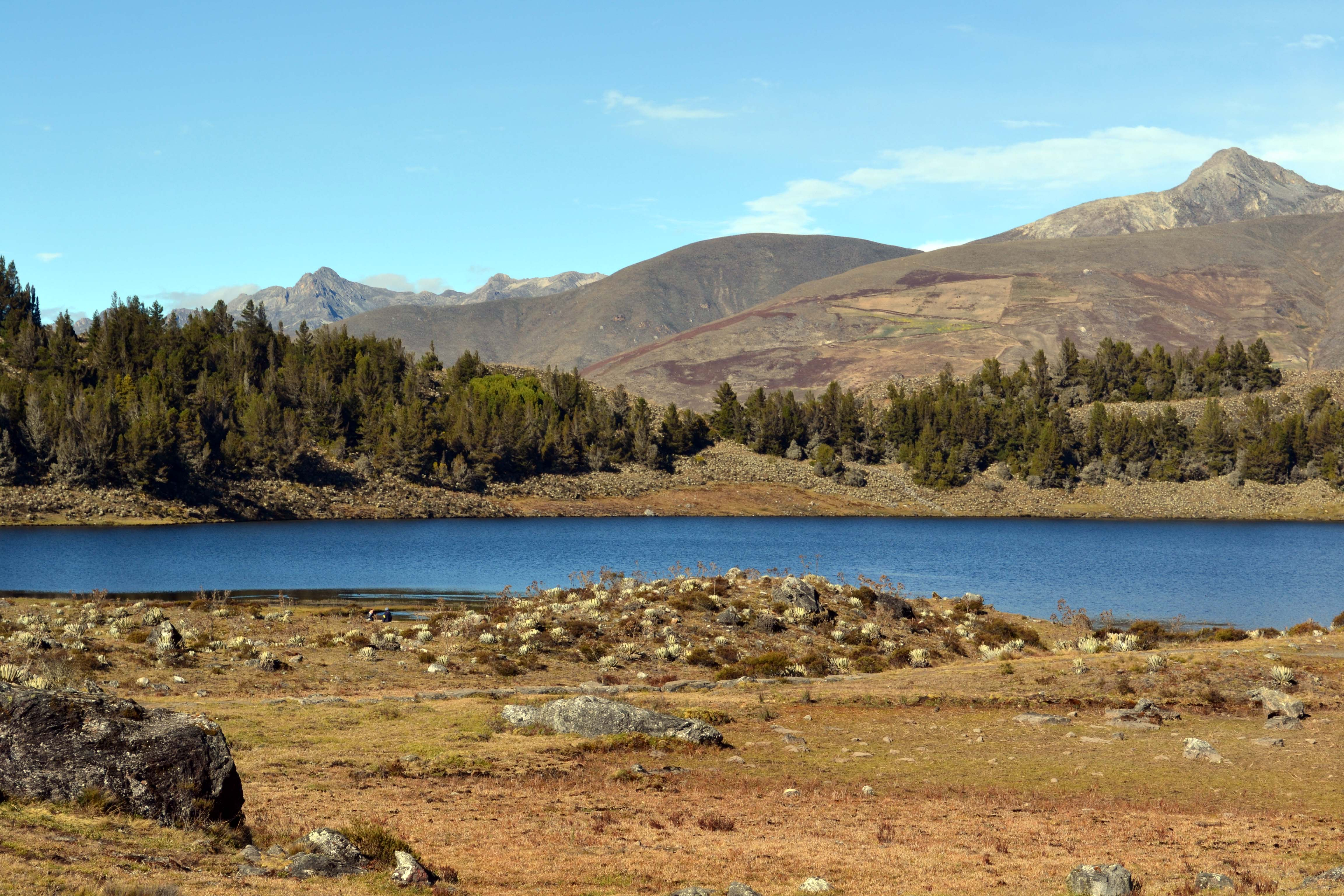 La laguna de Mucubají está situada entre 3625-3655 msnm1 en el Parque Sierra Nevada, en el estado Mérida de Venezuela.